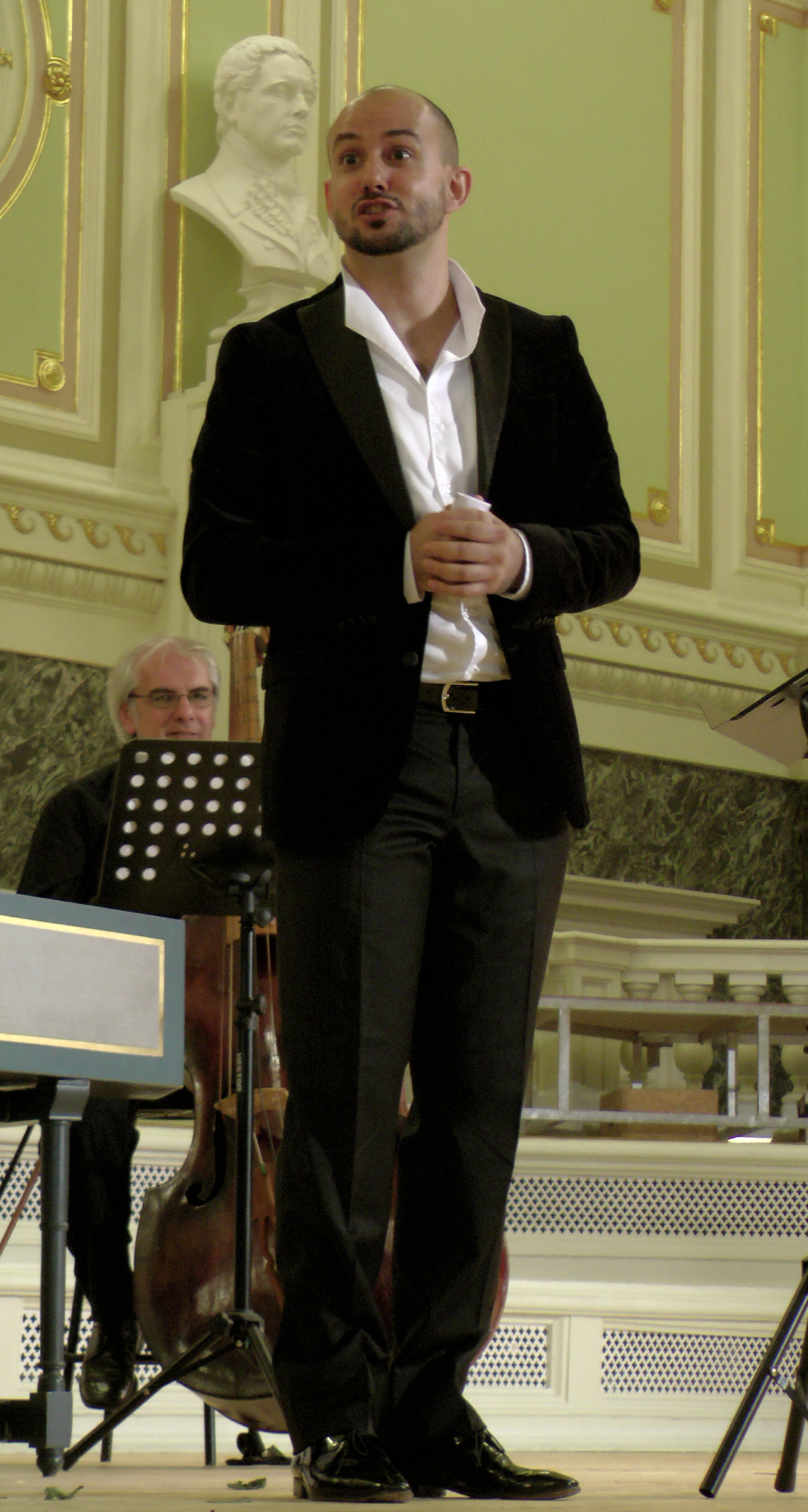 Франко Фаджоли на фестивале Earlymusic. Санкт-Петербург, 17.09.2014. Академическая капелла.